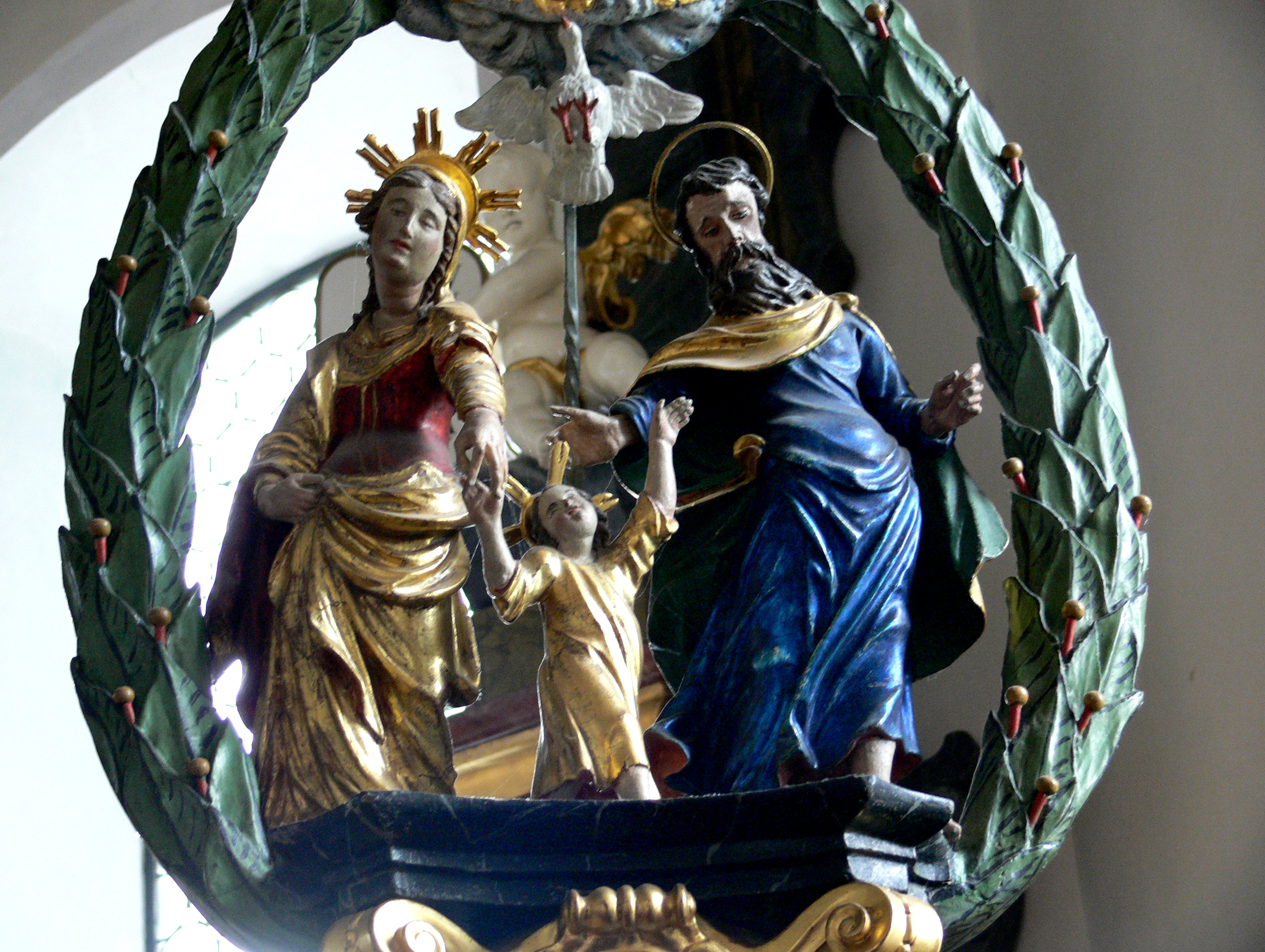 Schwarzenberg, Vorarlberg: Pfarrkirche Heiligste Dreifaltigkeit Bruderschaftsstange mit Darstellung des hl. Wandels